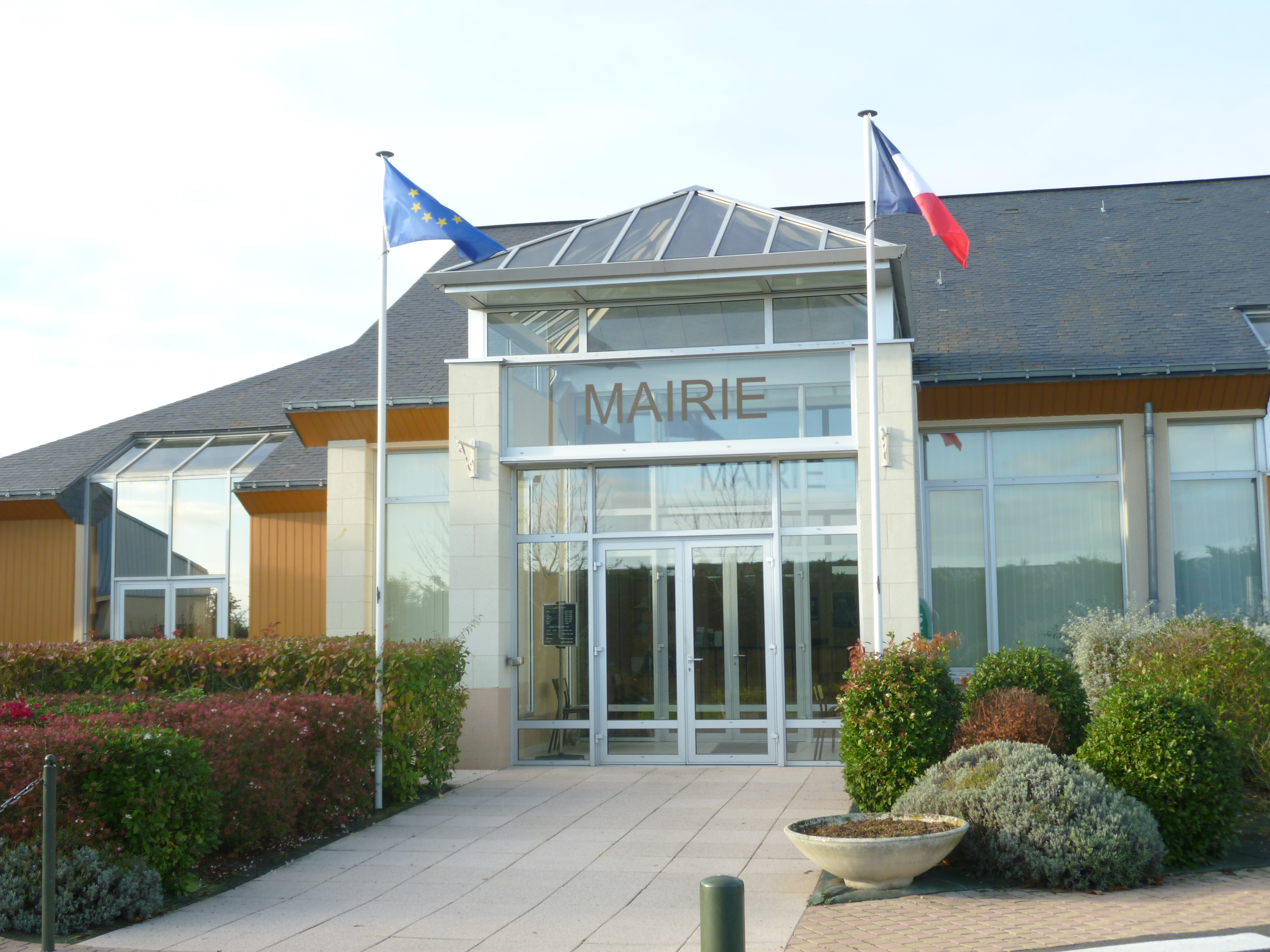 Photo de la mairie de Brézé, commune du Maine-et-Loire, France.